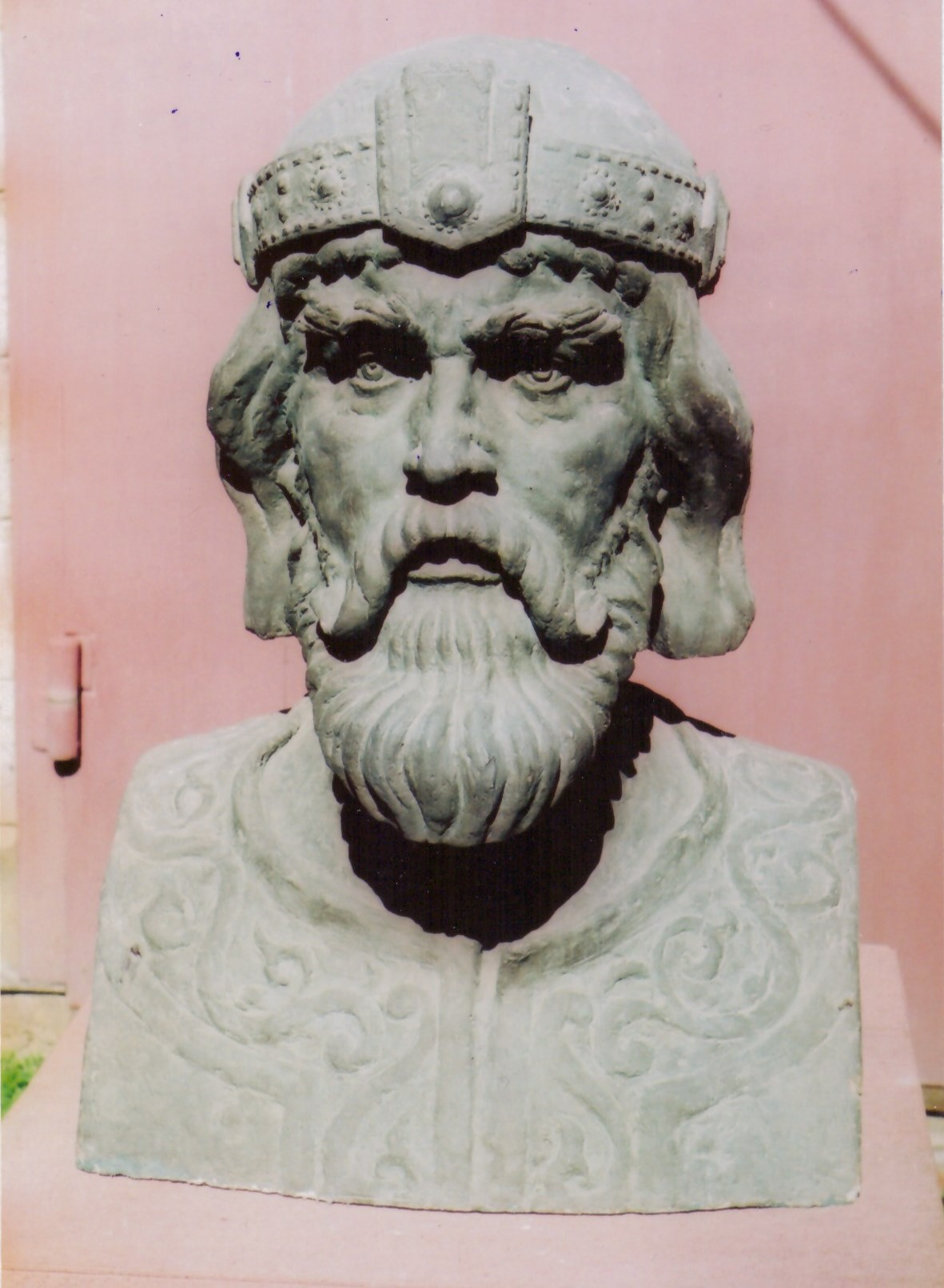 Портрет народного артиста УРСР Кукуюка П. в ролі Ярослава Мудрого. 1982. Скульптор Таранченко В.О. Склоцемент тонований. 72 х 53 х 45.